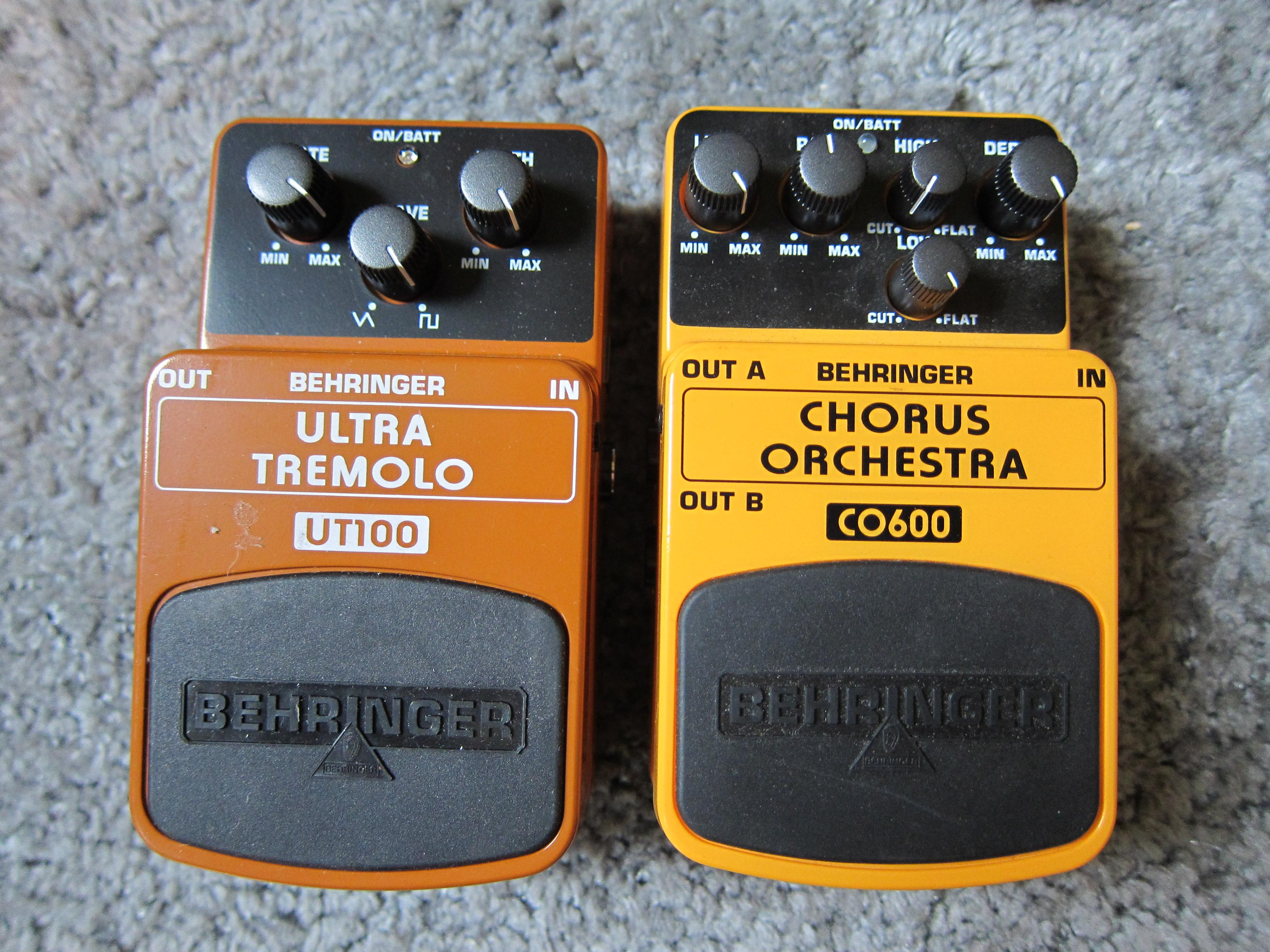 Behringer UT100 Ultra Tremolo & CO600 Chorus Orchestra